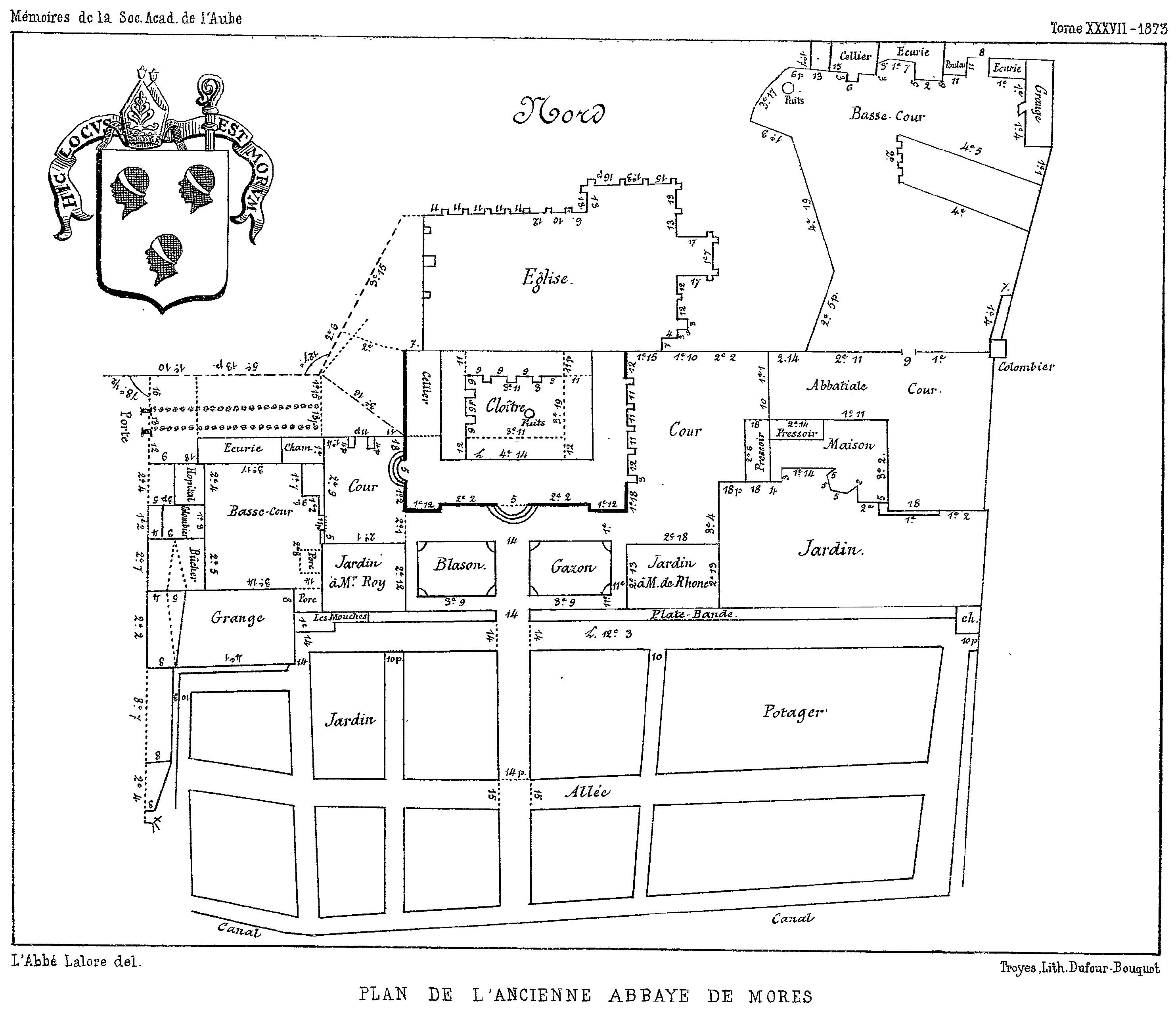 Plan de l'abbaye de Mores